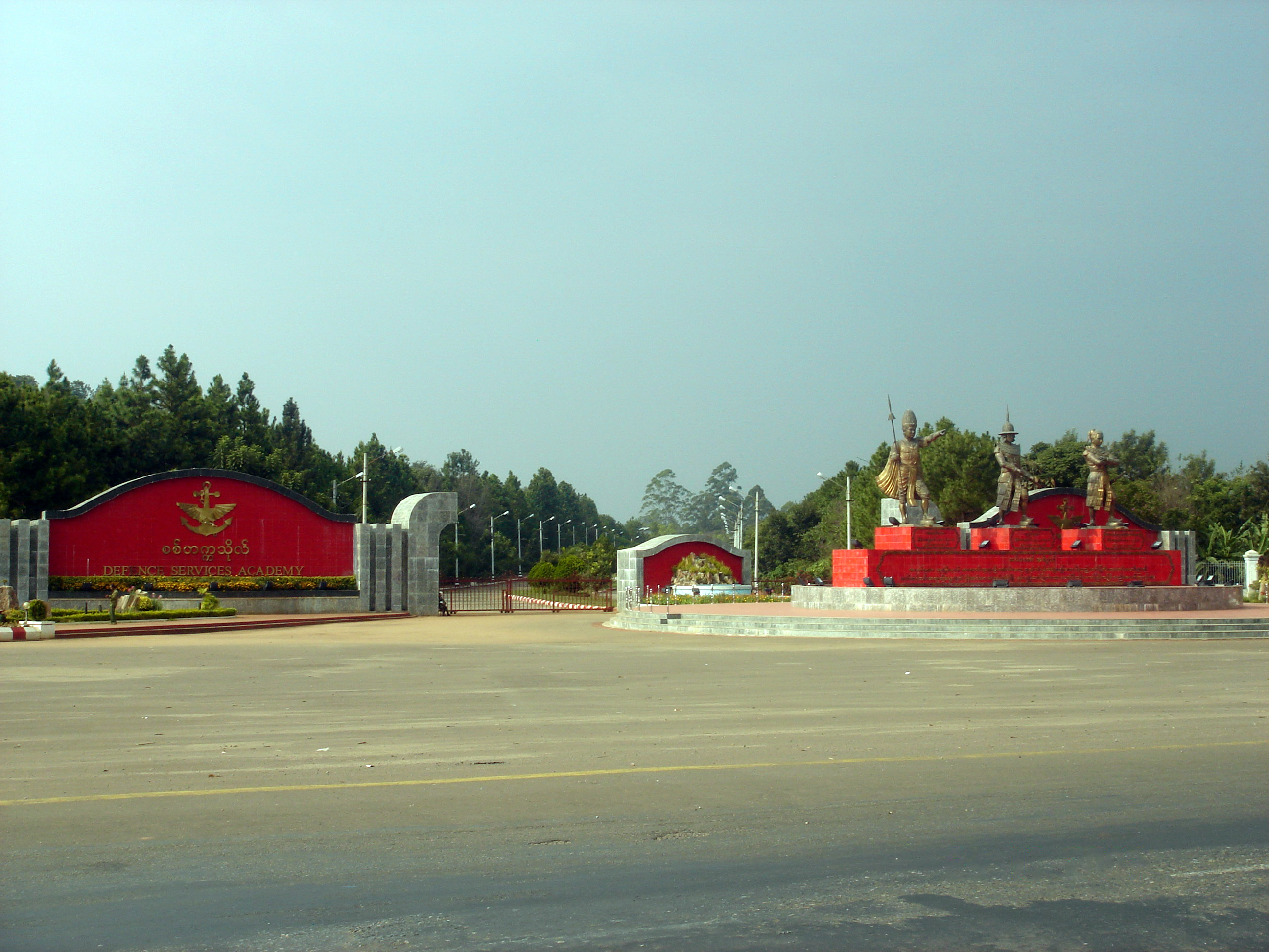 DSA in Pyin U Lwin, Myanmar